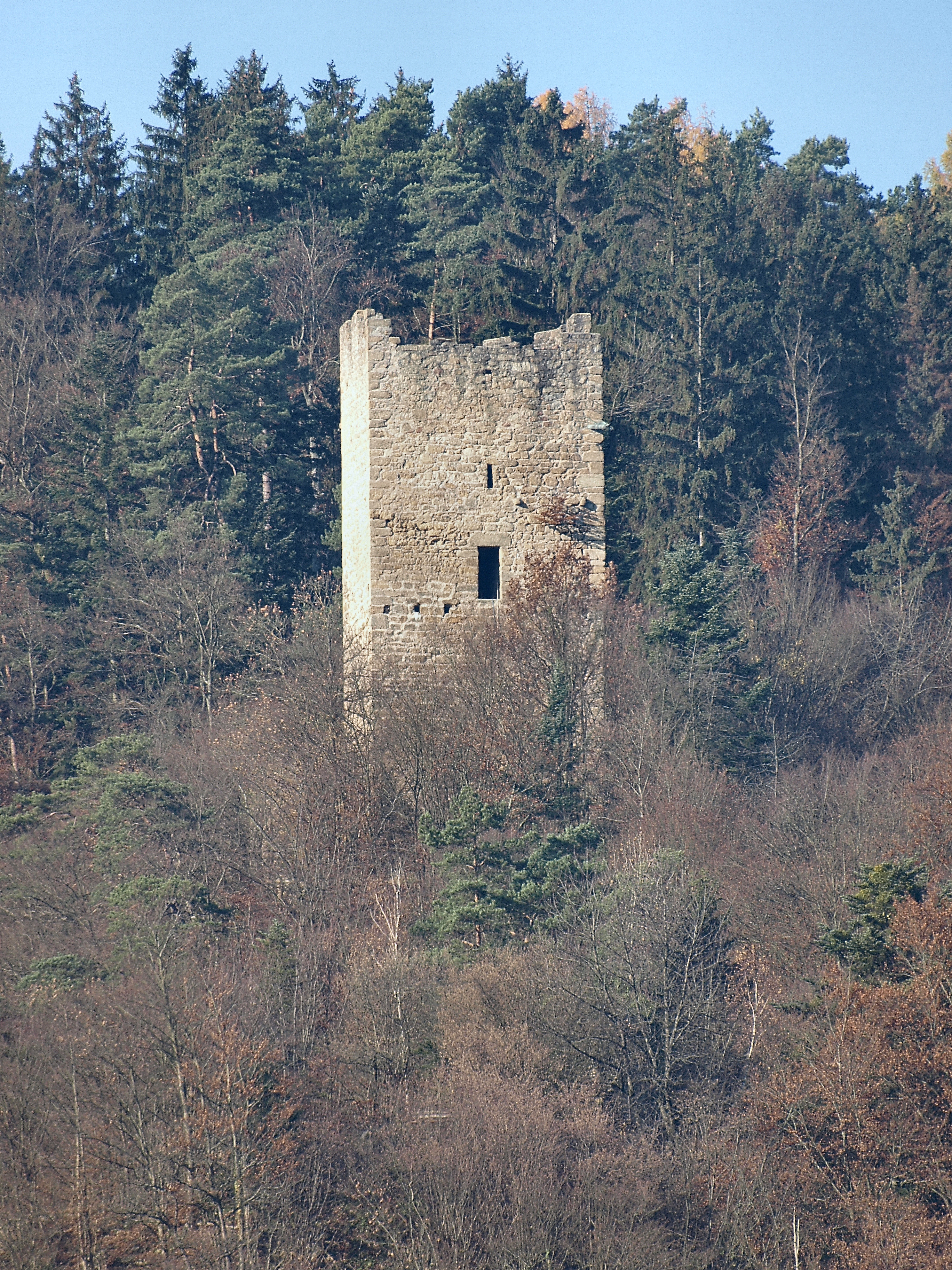 Burgruine Freyenstein